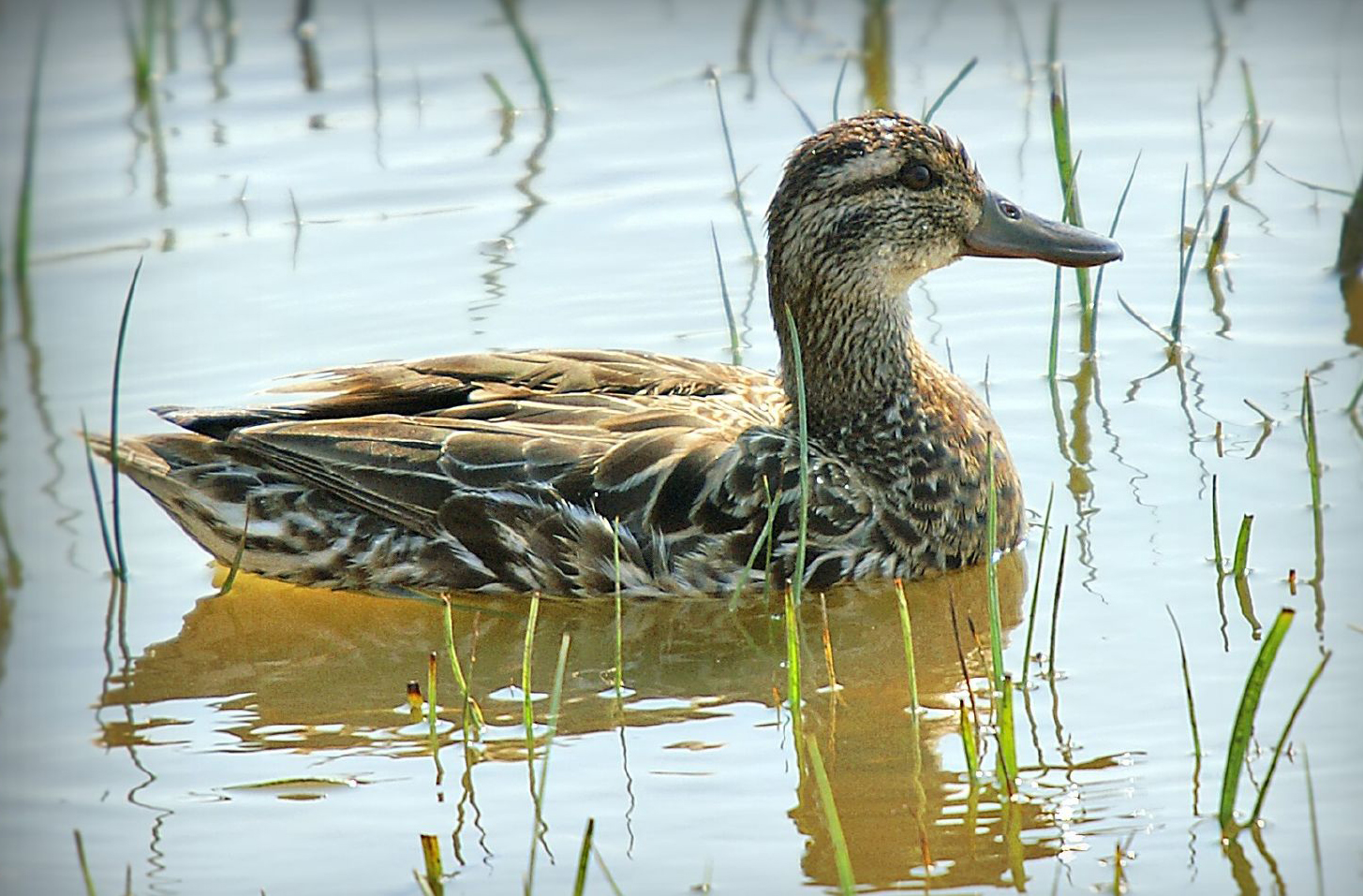 Cerceta carretona / Xarrasclet / Garganey Anas querquedula, female. Llobregat Delta, Barcelona, Spain